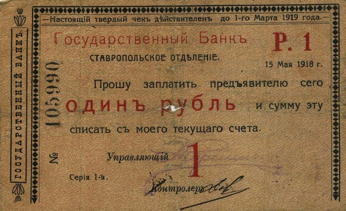 Твёрдый чек 1 рубль Ставропольского отделения Госбанка. 1918. Аверс.